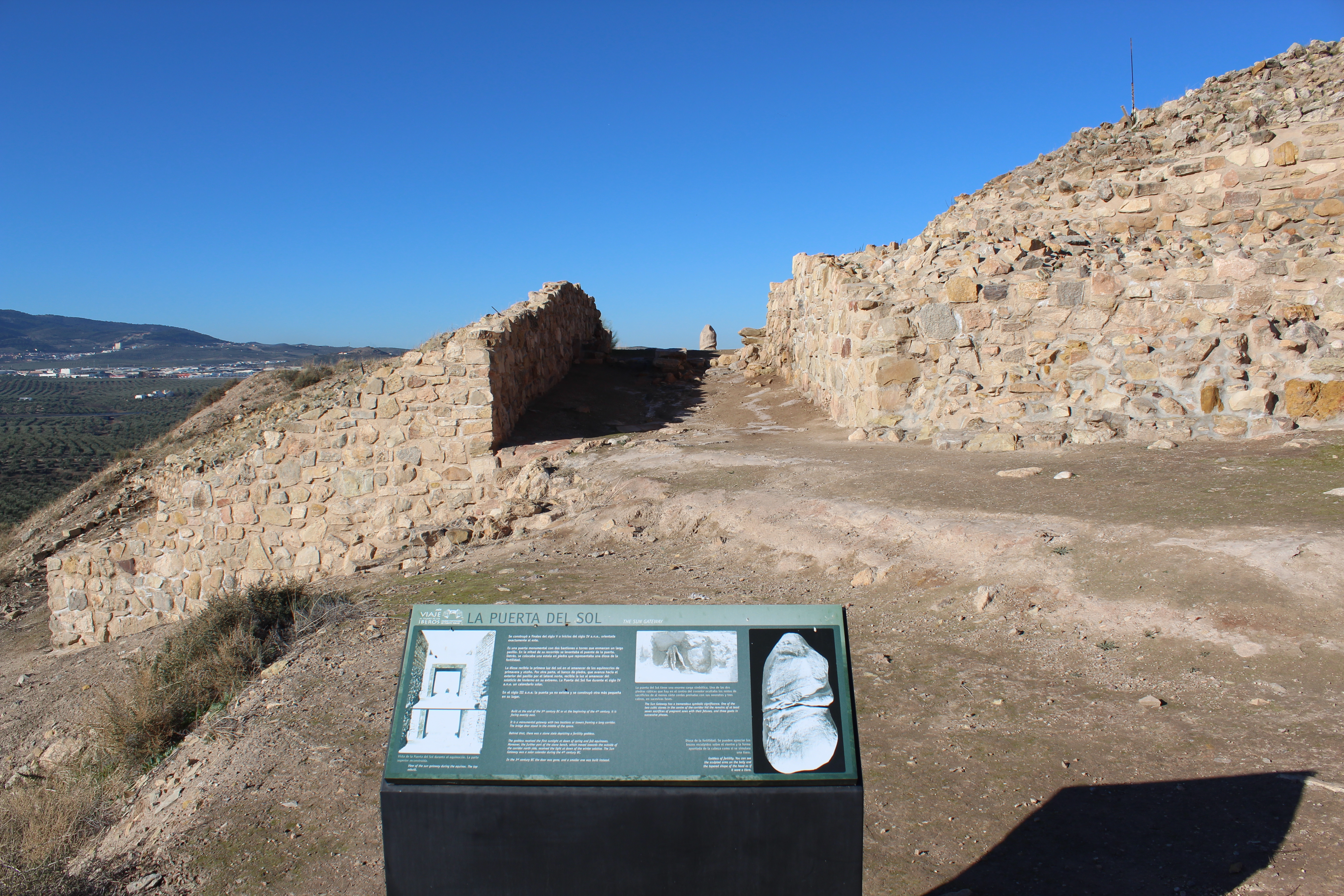 Puerta del Sol y panel informativo.